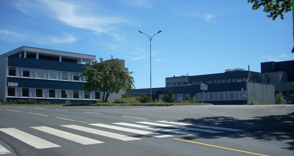 Tidligere Arendal Smelteverk, nå Saint-Gobain Eydehavn, ligger på Eydehavn, Arendal kommune, Aust-Agder